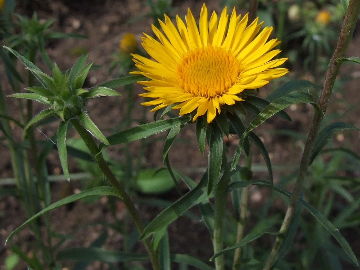 Inula_ensifolia